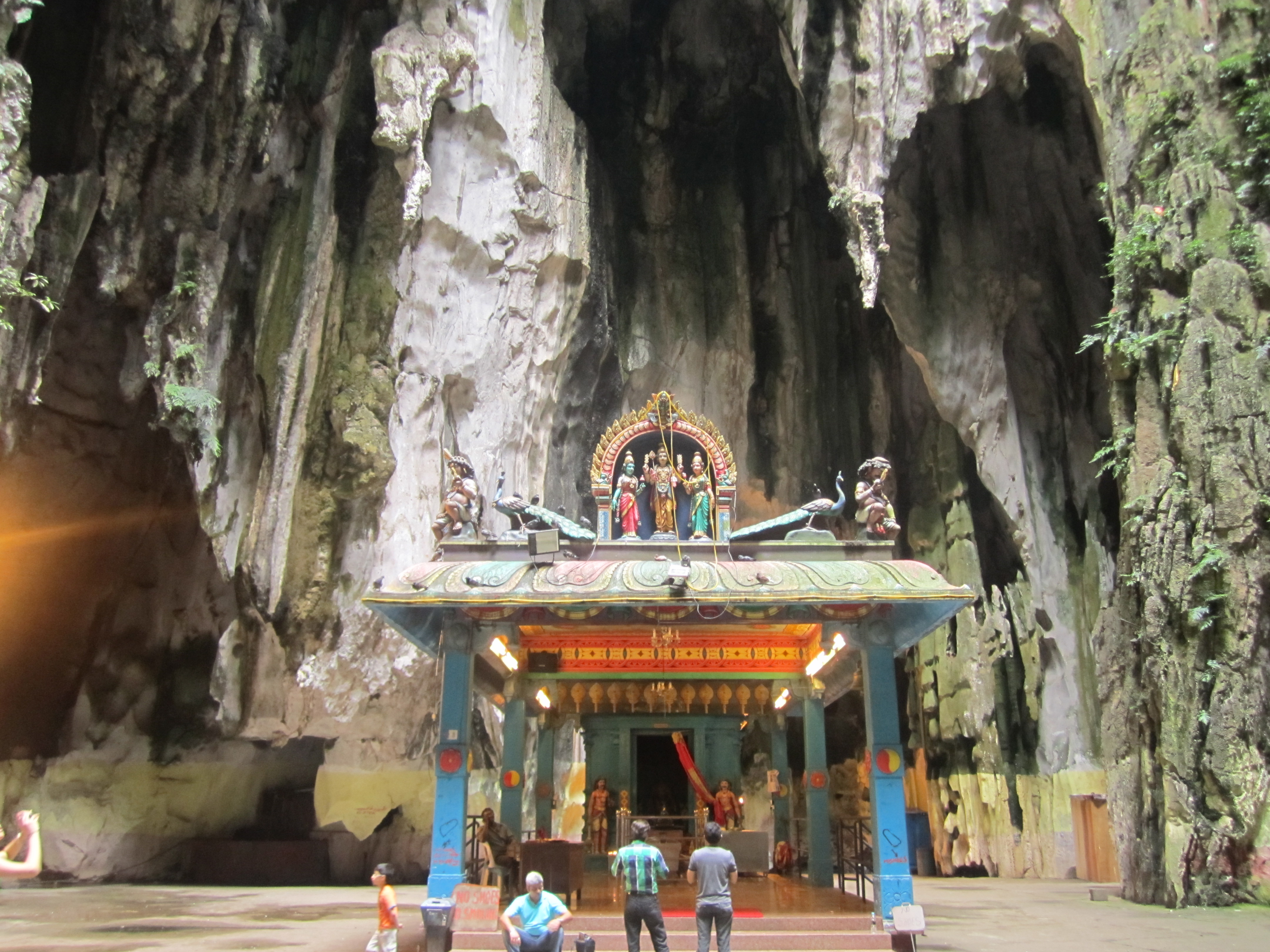 Temple Batu Caves located in Gombak district, north of Kuala Lumpur